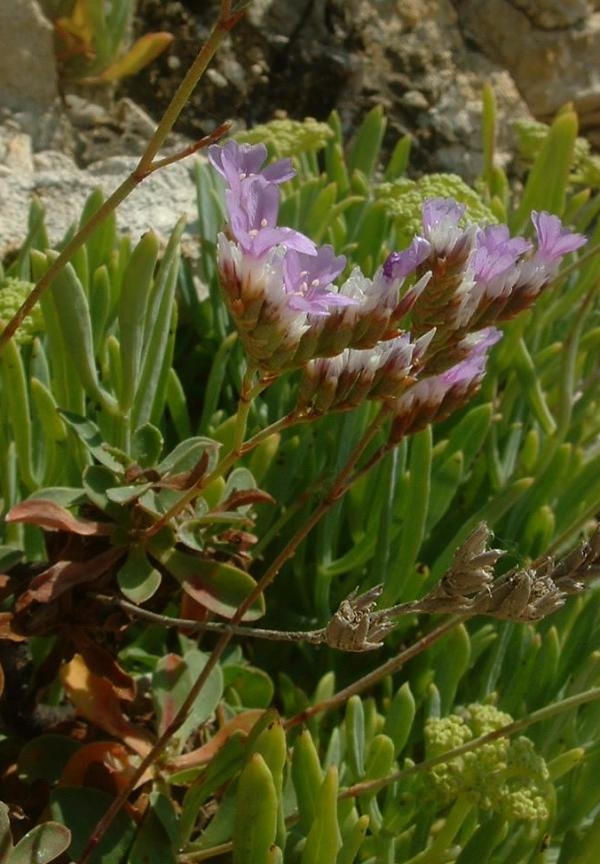 Statice de l'ouest, photo J.F. Gaffard, Talmont-Saint-Hilaire, juillet 2004